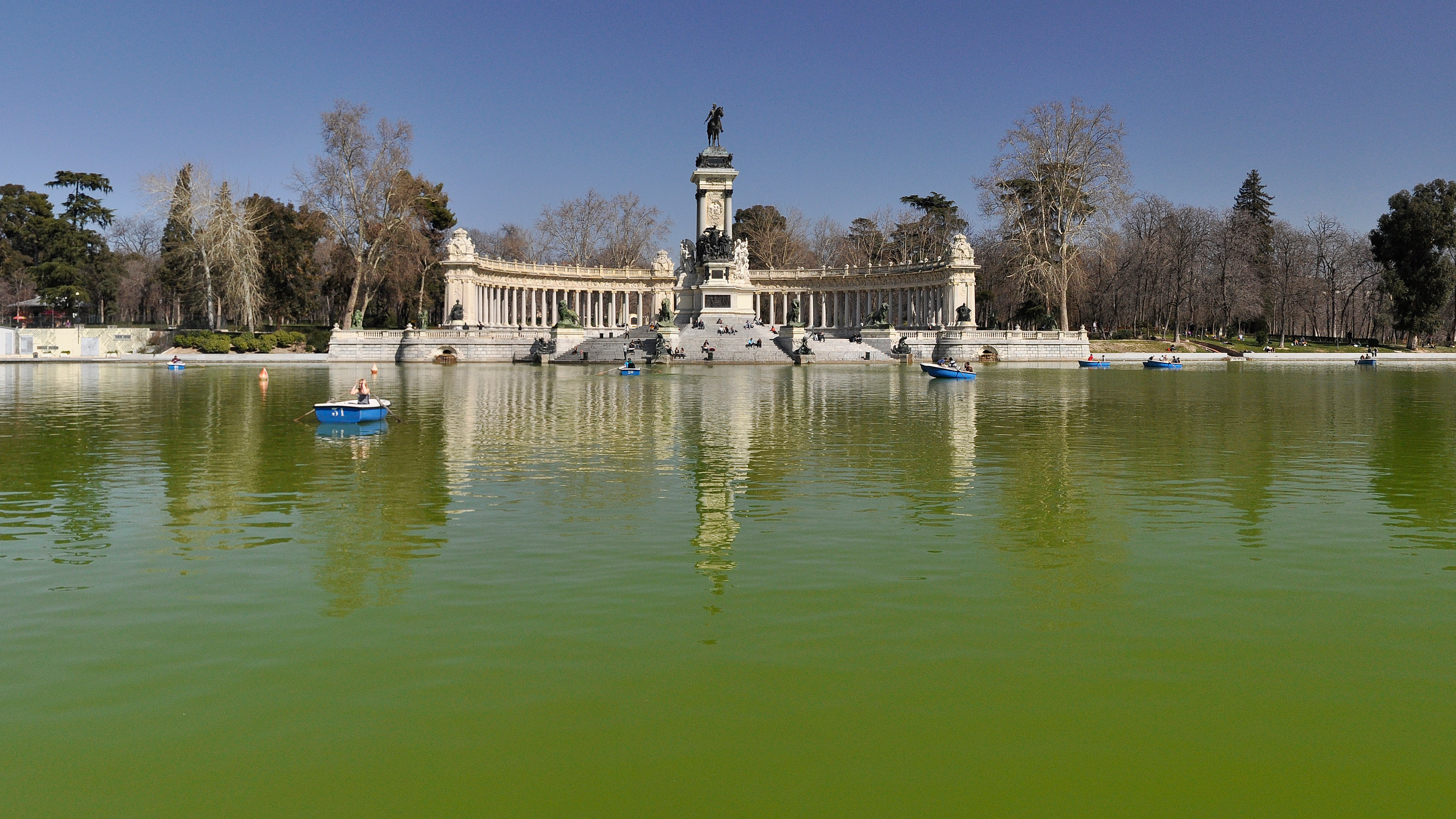 Vijver en monument van Alfonso XII in het park El Retiro in Madrid, Spanje